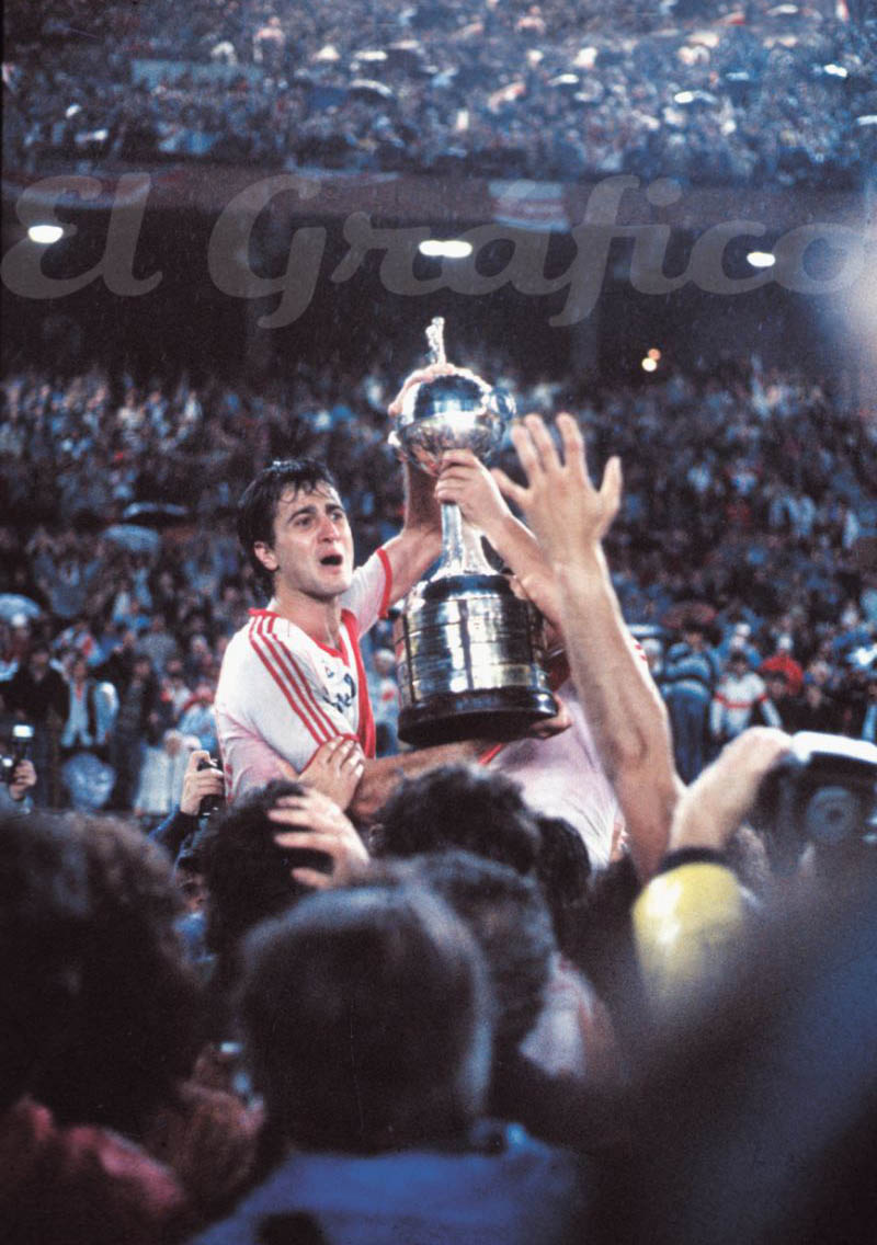 Norberto Alonso, levantando la Copa Libertadores de 1986, ganada por River Plate.